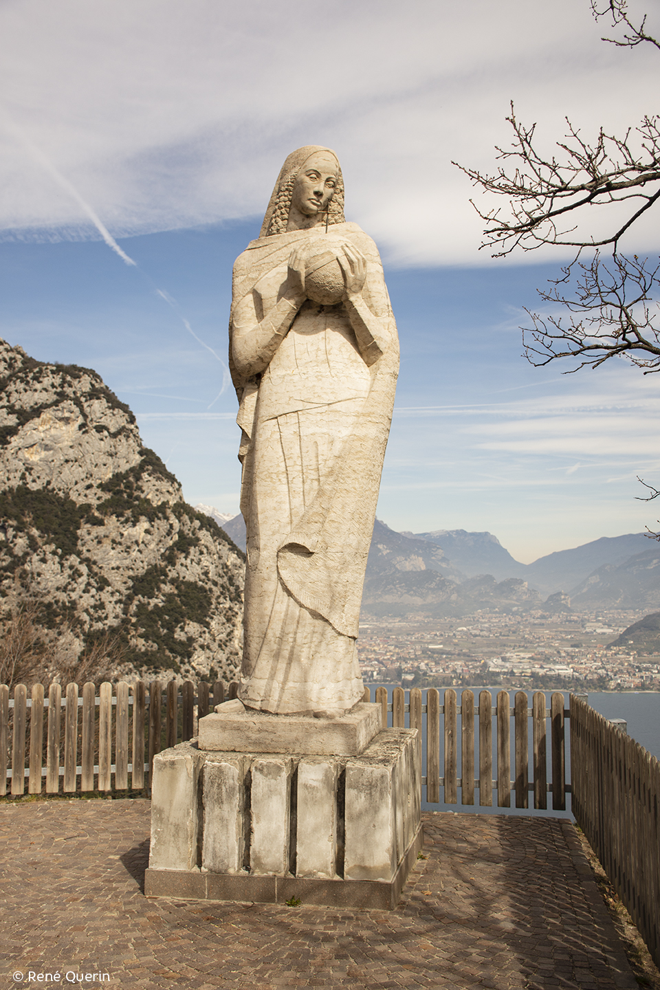 La statua Regina Mundi che si trova sulla strada per Pregasina